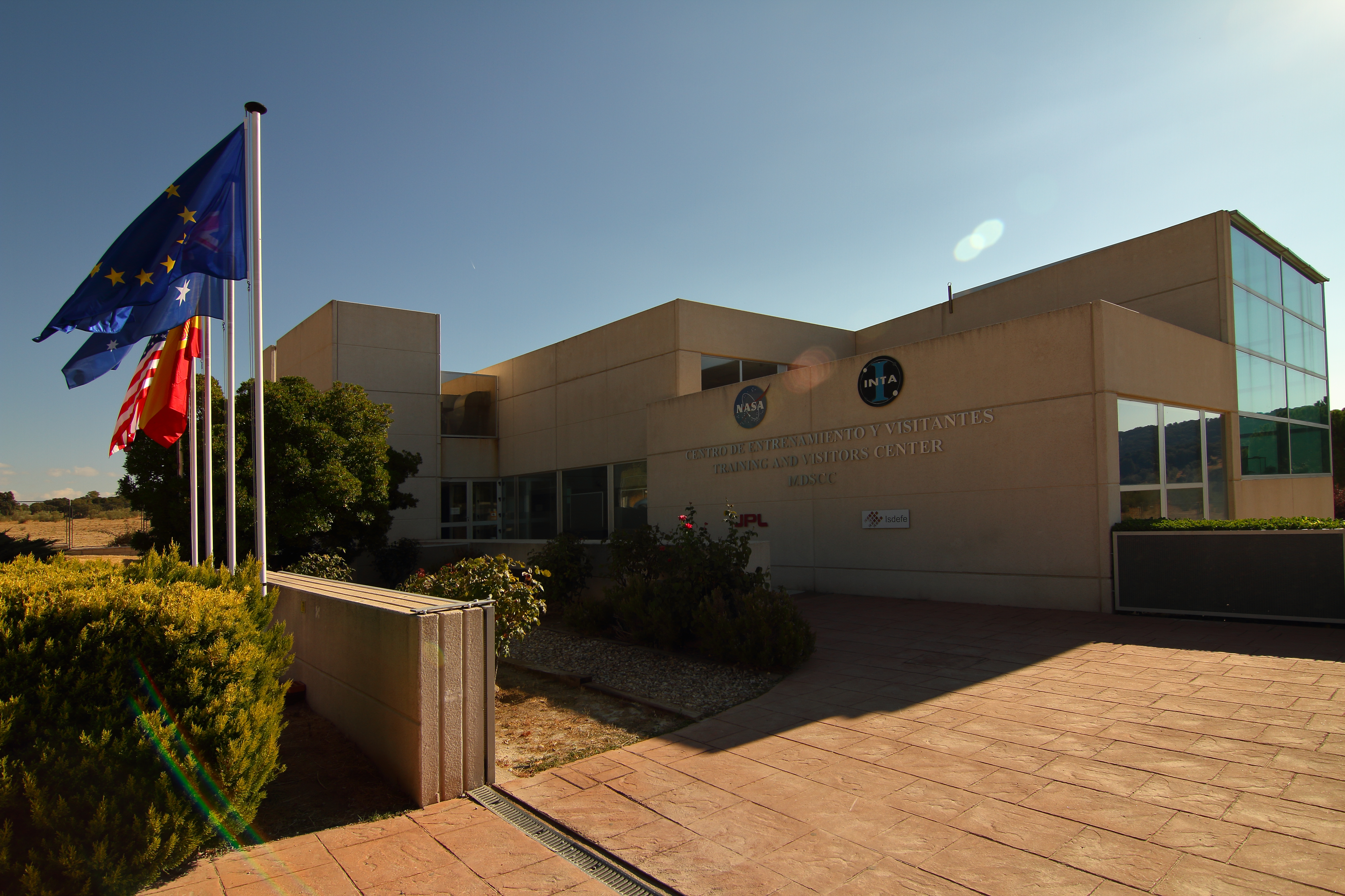 Edifico del museo del Complejo de Comunicaciones del Espacio Profundo de Madrid